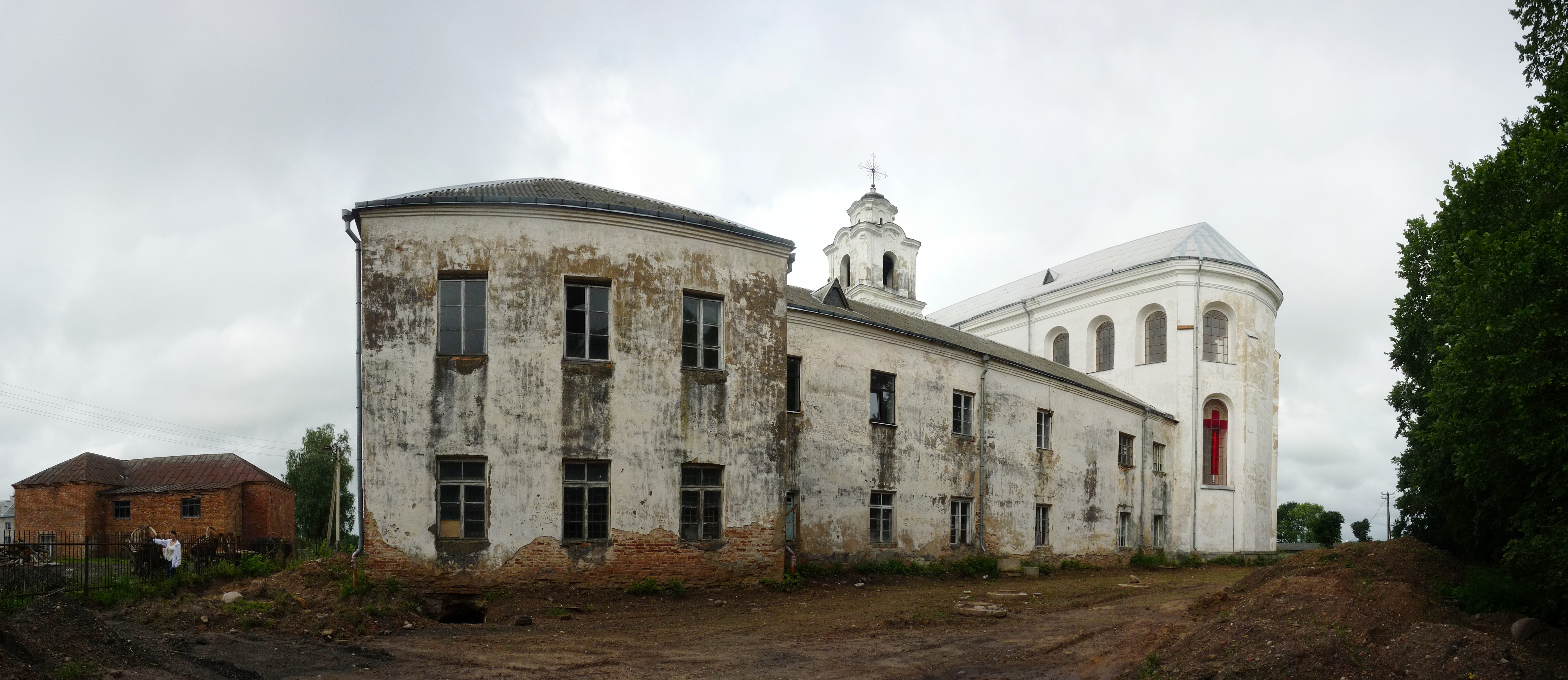 Беларуская (тарашкевіца): Ансамбль былога кляштара бэрнардынаў: Троіцкі касьцёл. Фрагмэнт дэкаратыўнай кампазыцыі ў галоўным алтары, жылы корпус, агароджа з брамай. г. п. Друя